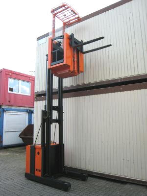 Elektrischer Hochhubkommissionierer OMG 902, Baujahr 2002, zweifaches Hubgerüst, Polyurethanreifen Hubhöhe: 4050 mm, Eigengewicht: 2900 kg, Gabellänge: 1000 mm, Tragfähigkeit: 800 kg, Bauhöhe: 2400 mm